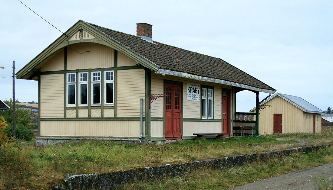 Kraby stasjon, Skreiabanen. Paul Due, 1902